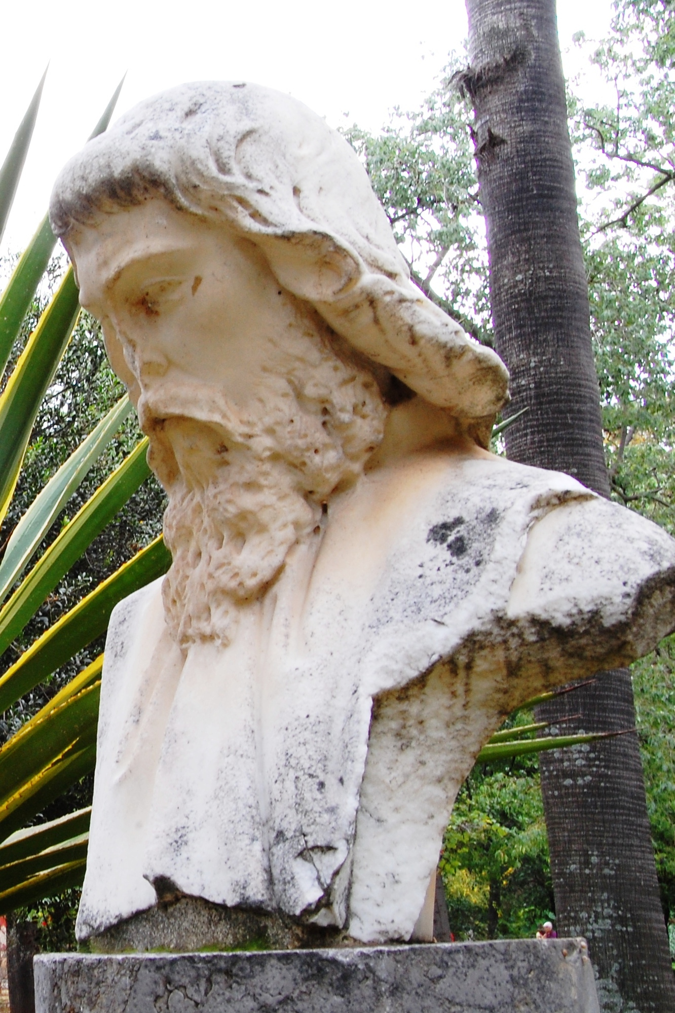 Busto marmoreo di Ciullo d'AlcamoVilla Giulia (Palermo)